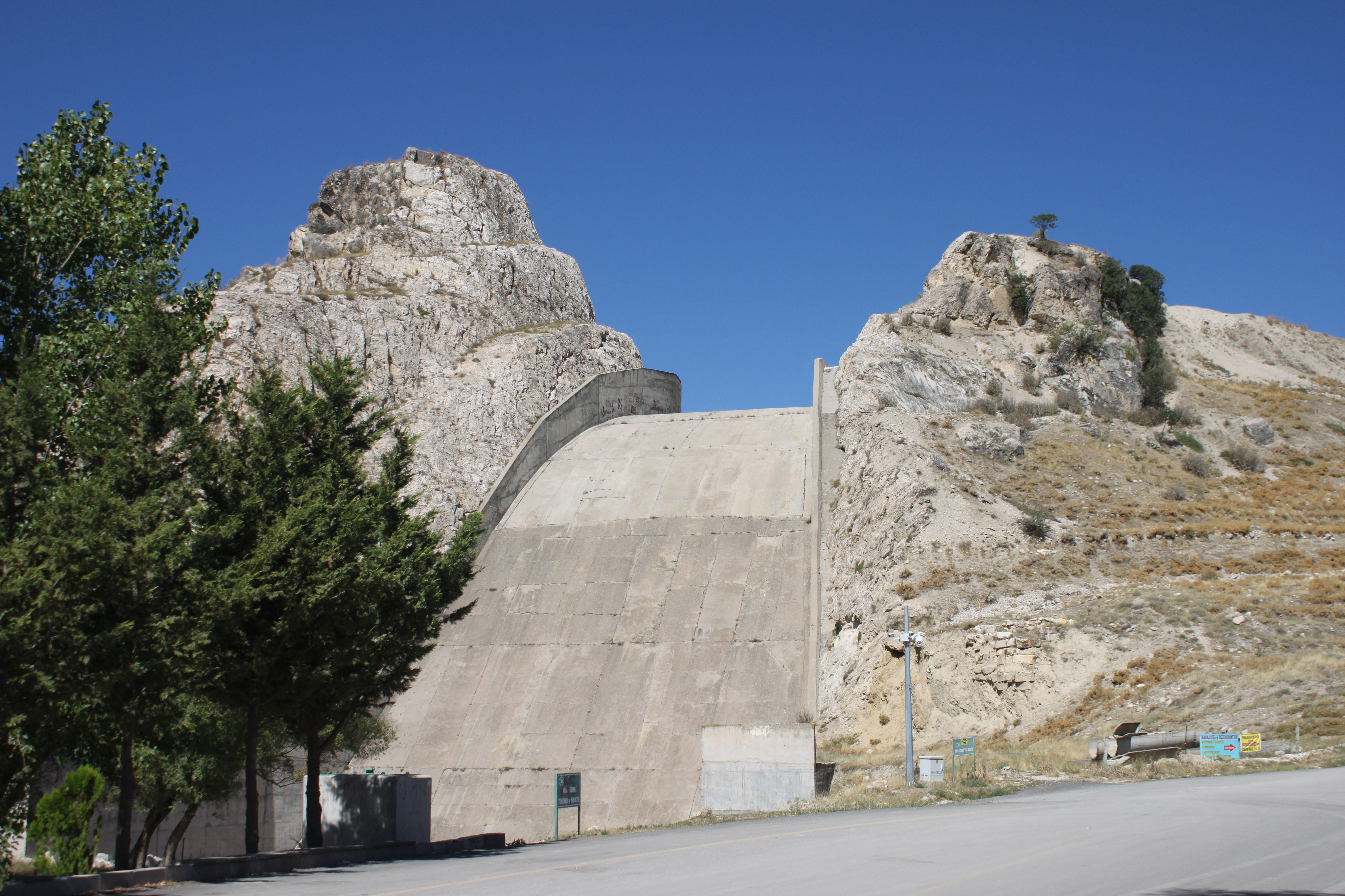 Im Falle eines Hochwasser wird hier das überflüssige Wasser abgelassen, bevor der Damm bricht.